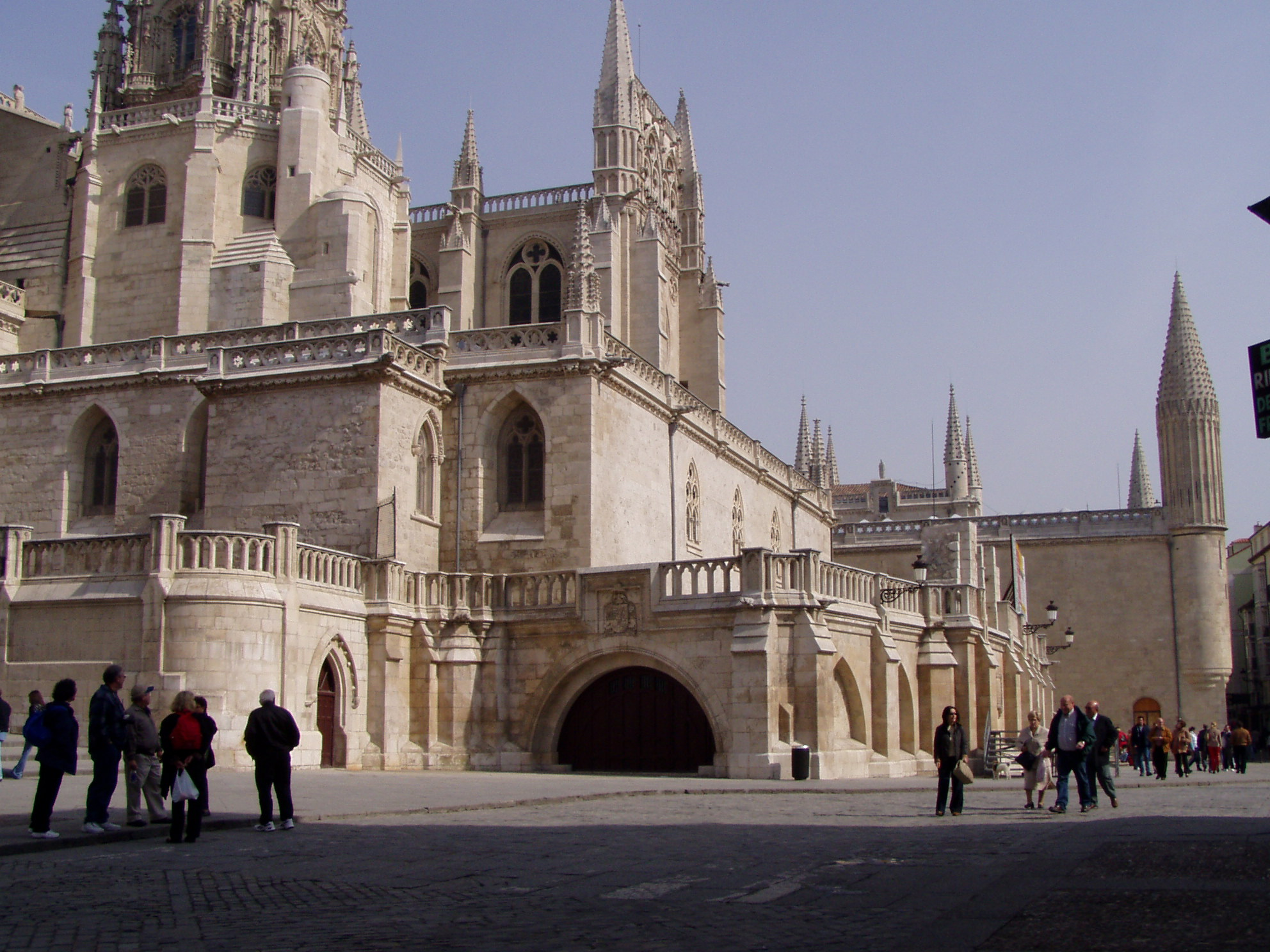 La Catedral de Burgos, España.